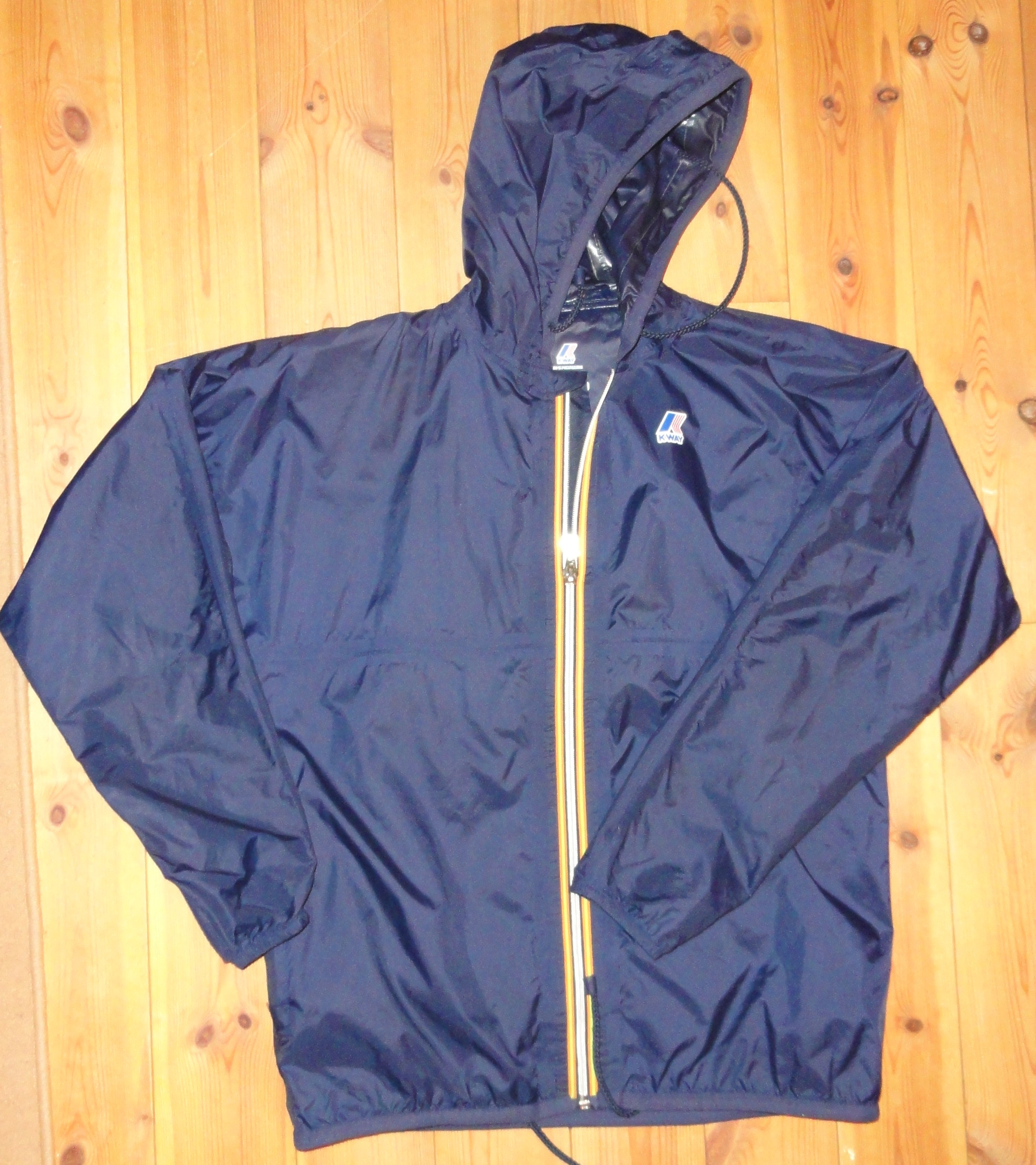 Et bilde av en K-Way regnjakke